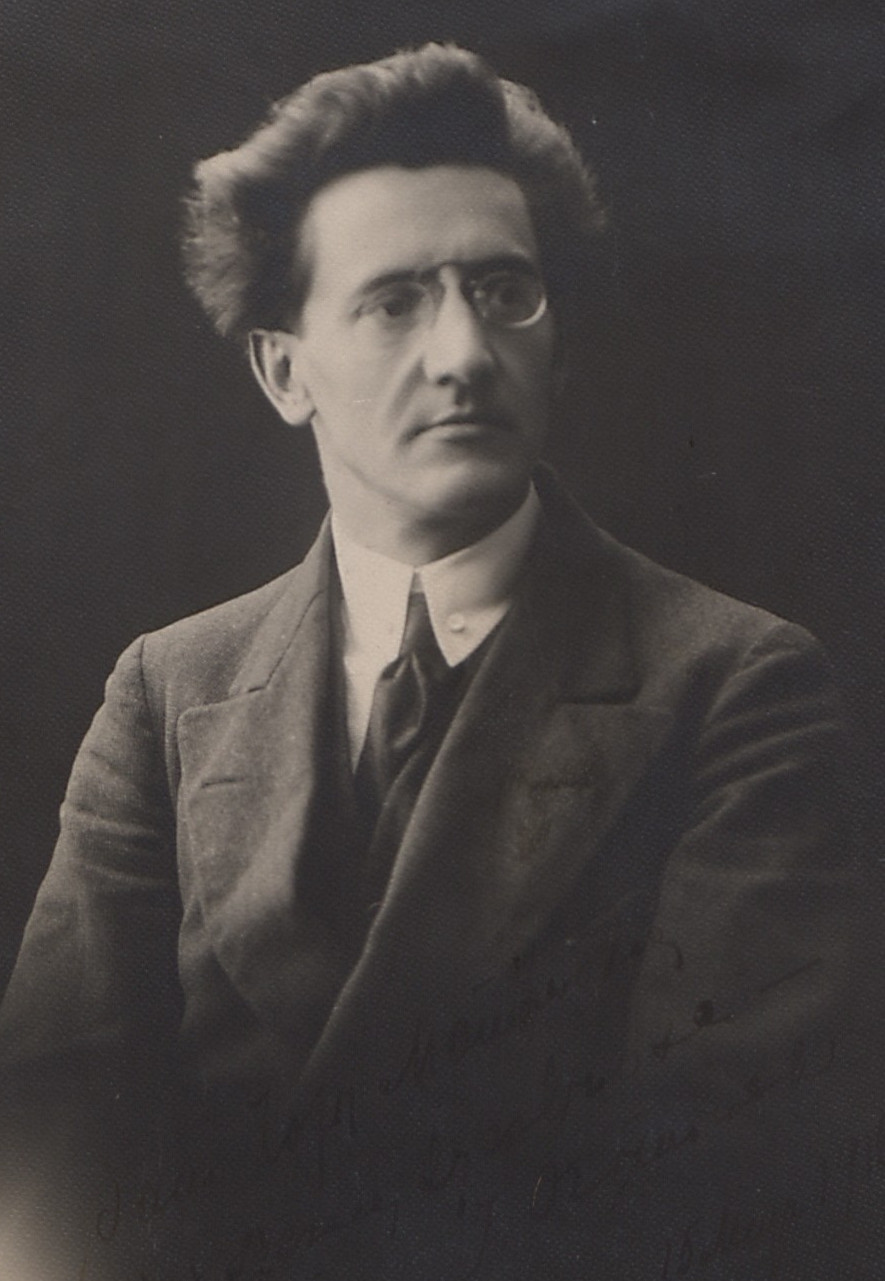 Józef Ozimiński, 1918 r.